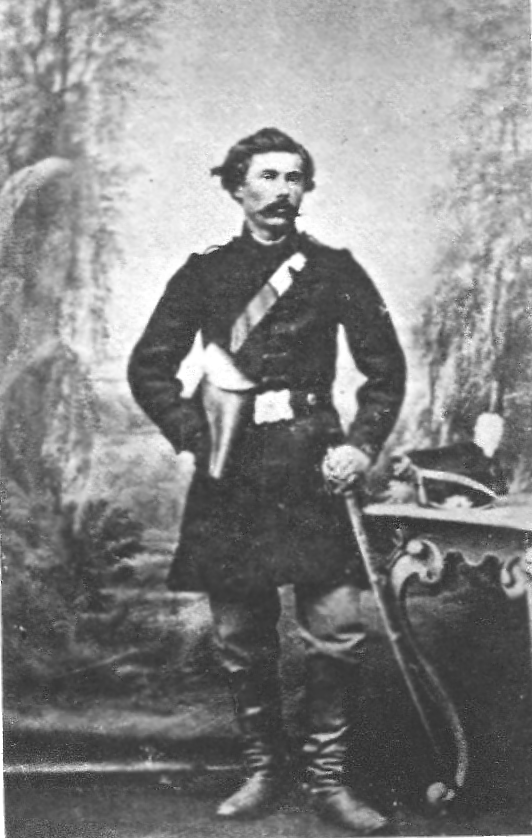 Ignacy Chmieleński